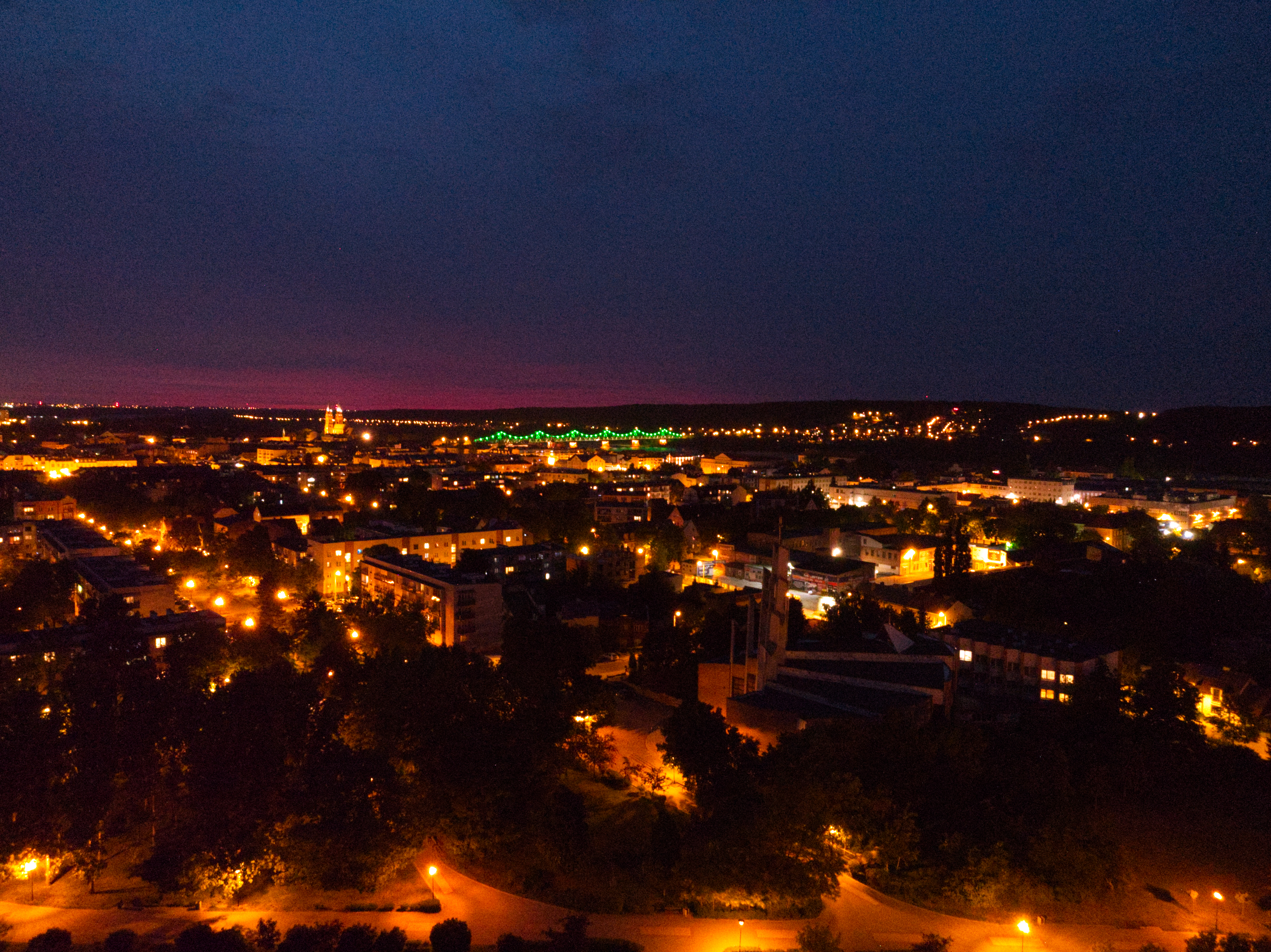 Śródmieścia (2020 r.)